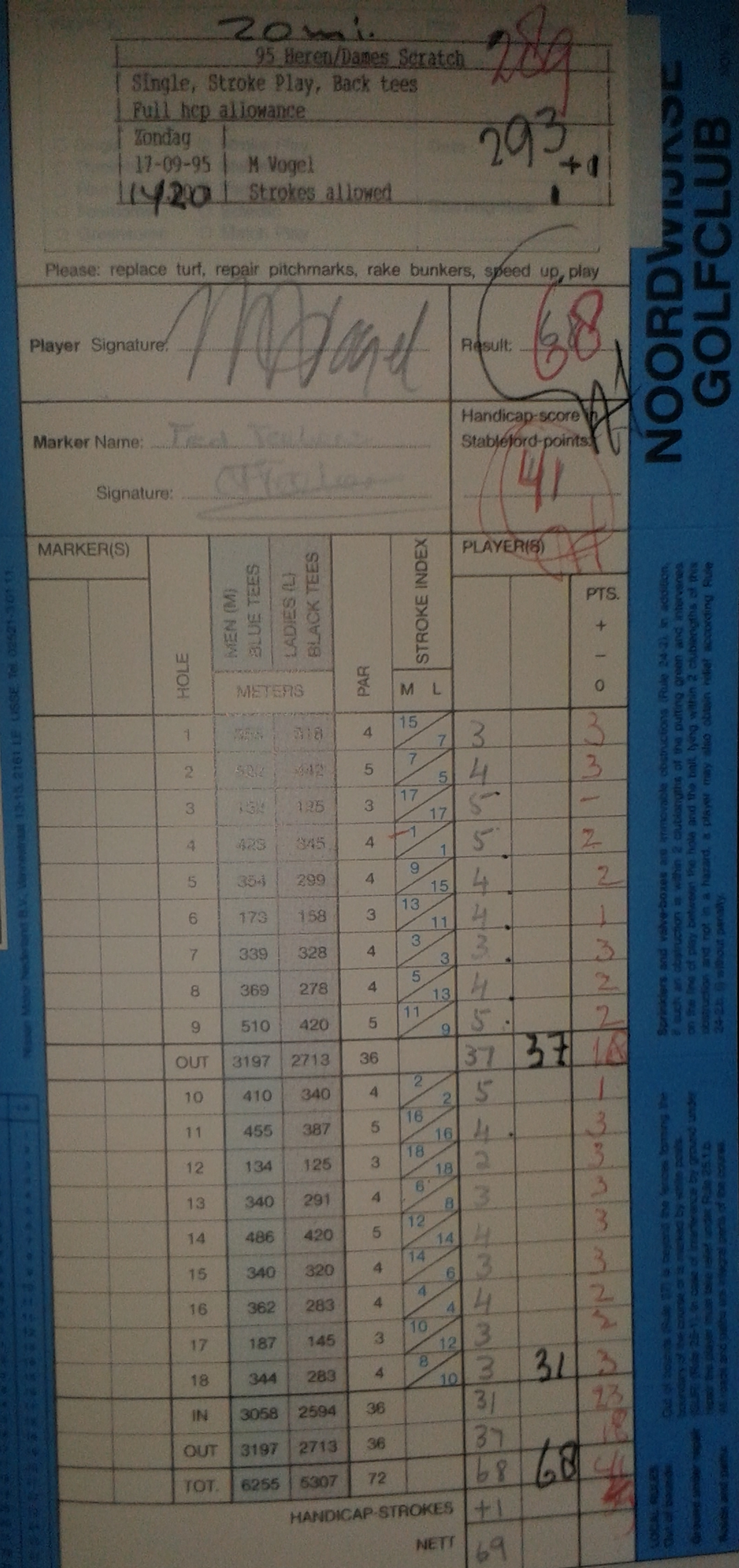 Spelerskaart M. Vogel, Noordwijkse Golfclub 1995 - Foto van kaart bij Noordwijkse Golfclub. Baanrecord.